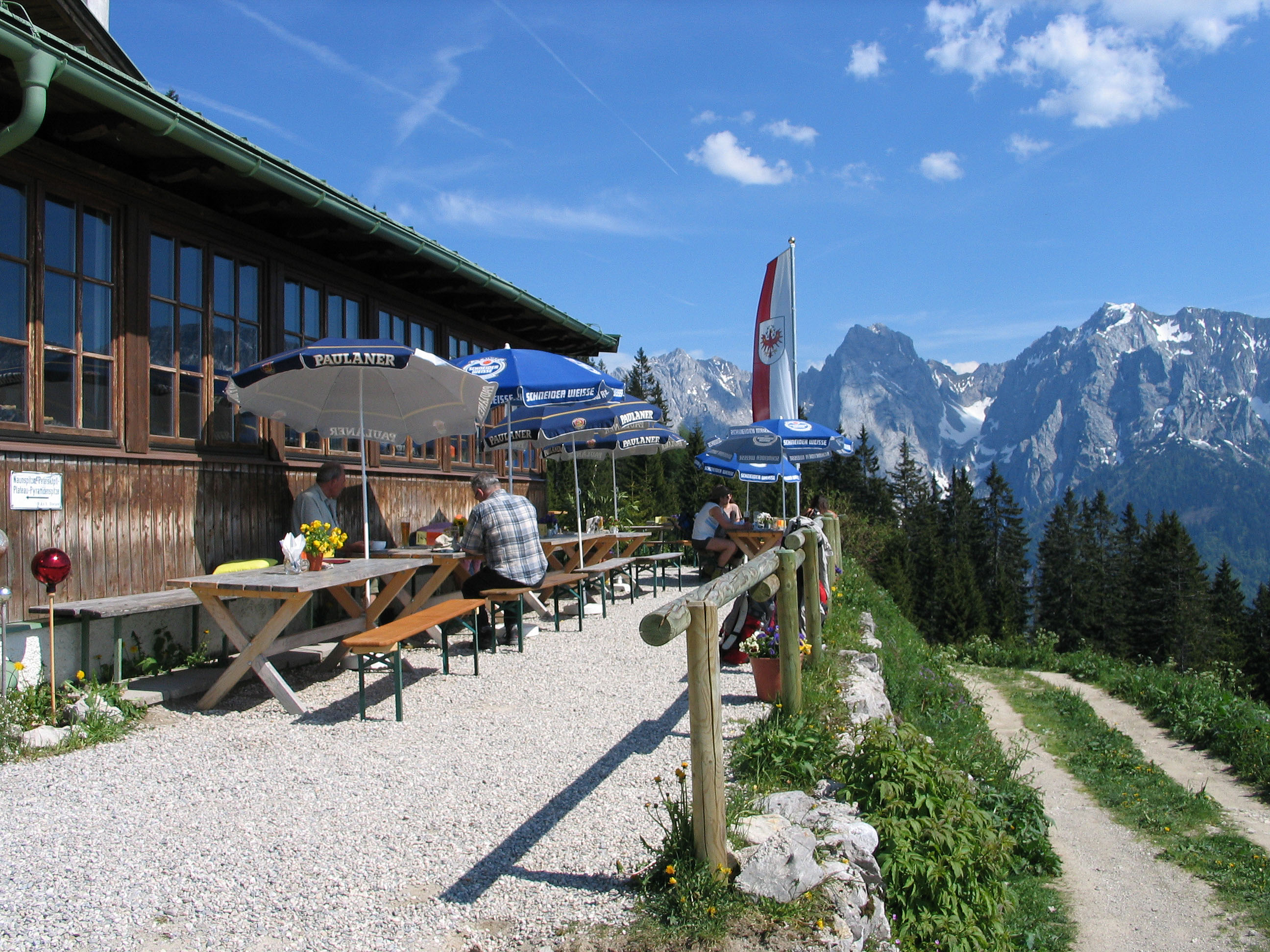 Vorderkaiserfeldenhütte (1388 m)